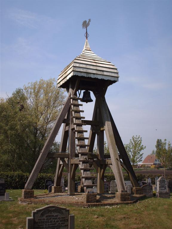 Klokkenstoel Bantega. Wooden bell tower in Bantega.